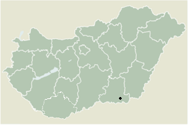 Makó